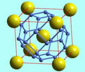 α-AgI-ren egitura